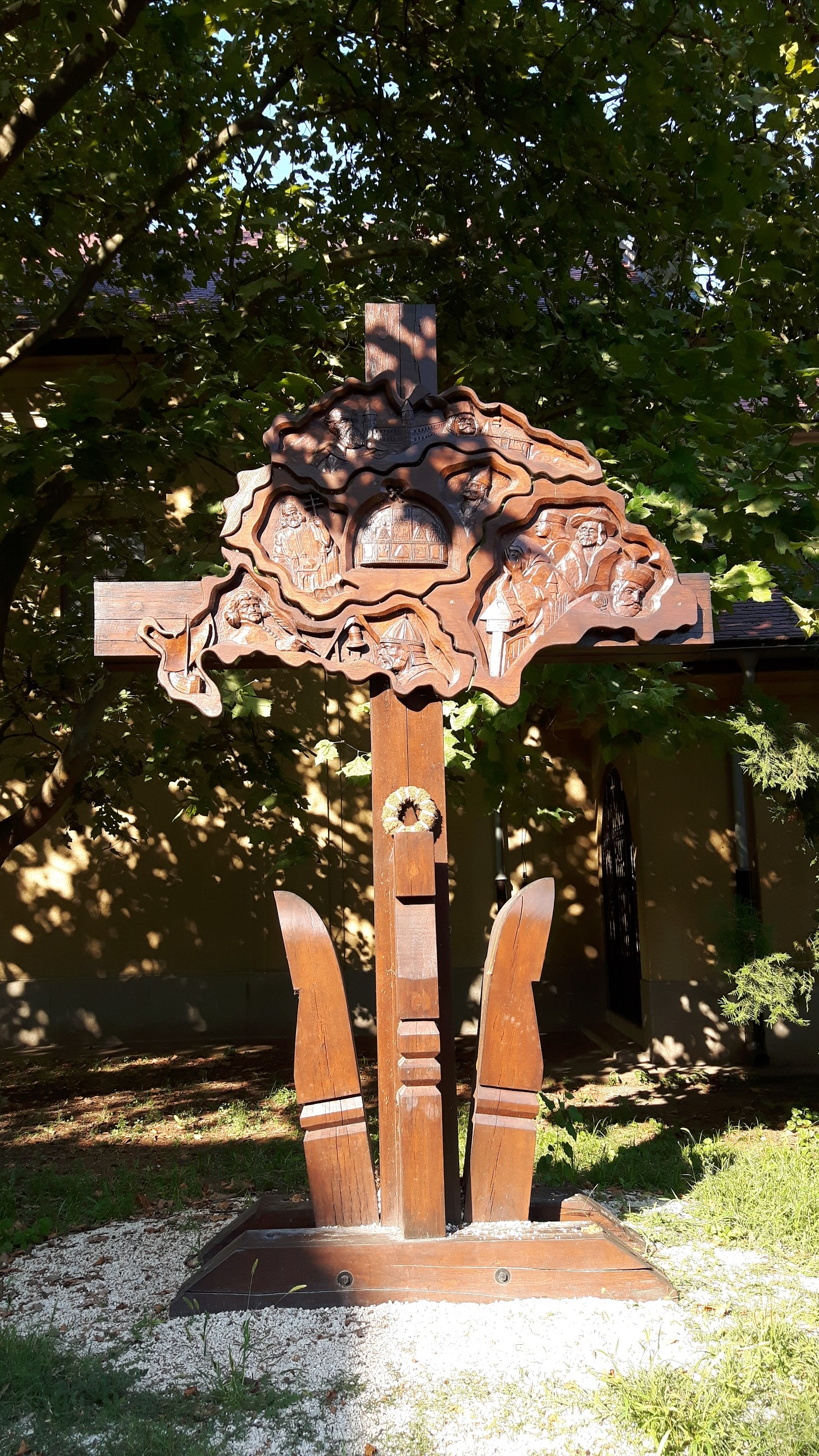 Béke téri trianoni emlékmű